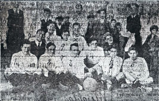 Betis en 1906, según Diego López Jiménez